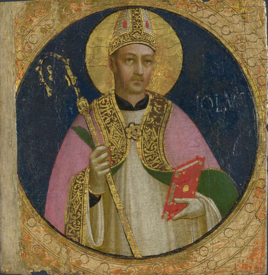 Beato angelico, pala di fiesole, san romolo.jpg